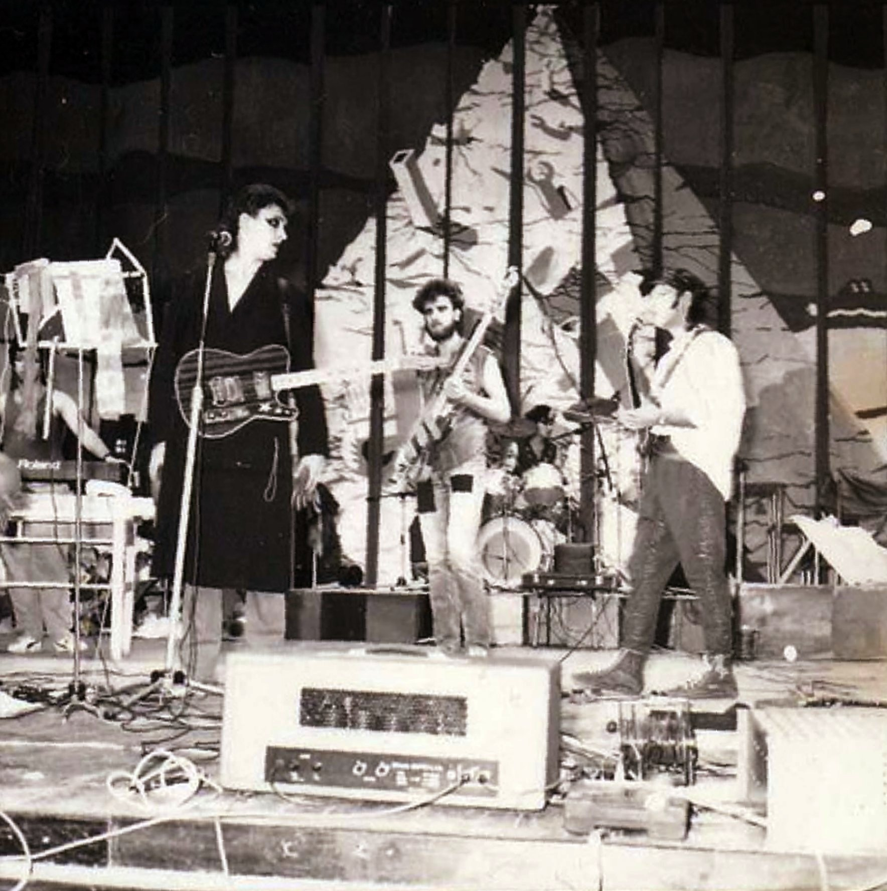 Рок-группа День и Вечер, фестиваль Харьковского рок-клуба, ДК ХТЗ, 1987. Слева направо: Валерий Посиделов (гитара, вокал), Алексей Неженцев (бас), Владимир Хоружий (гитара).